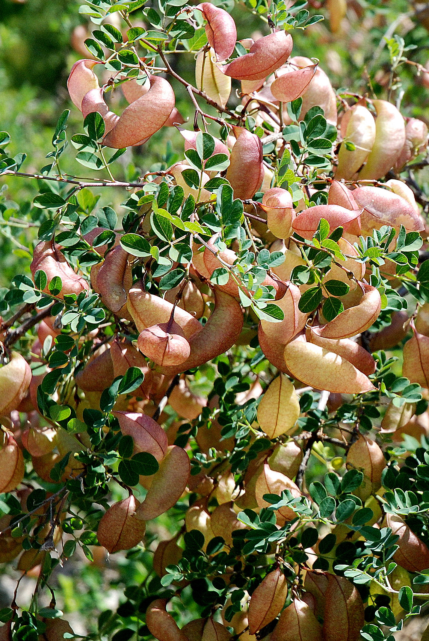 Colutea arborescens of blazenstruik